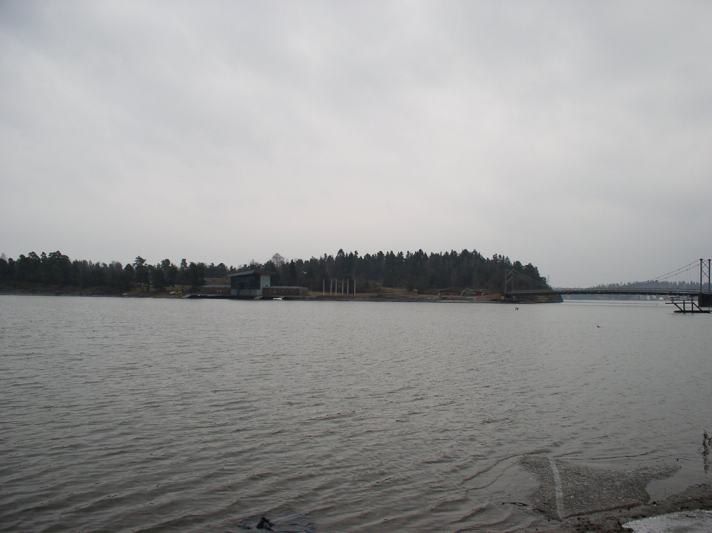 Kalvøya i Bærum kommune i Akershus, Norge